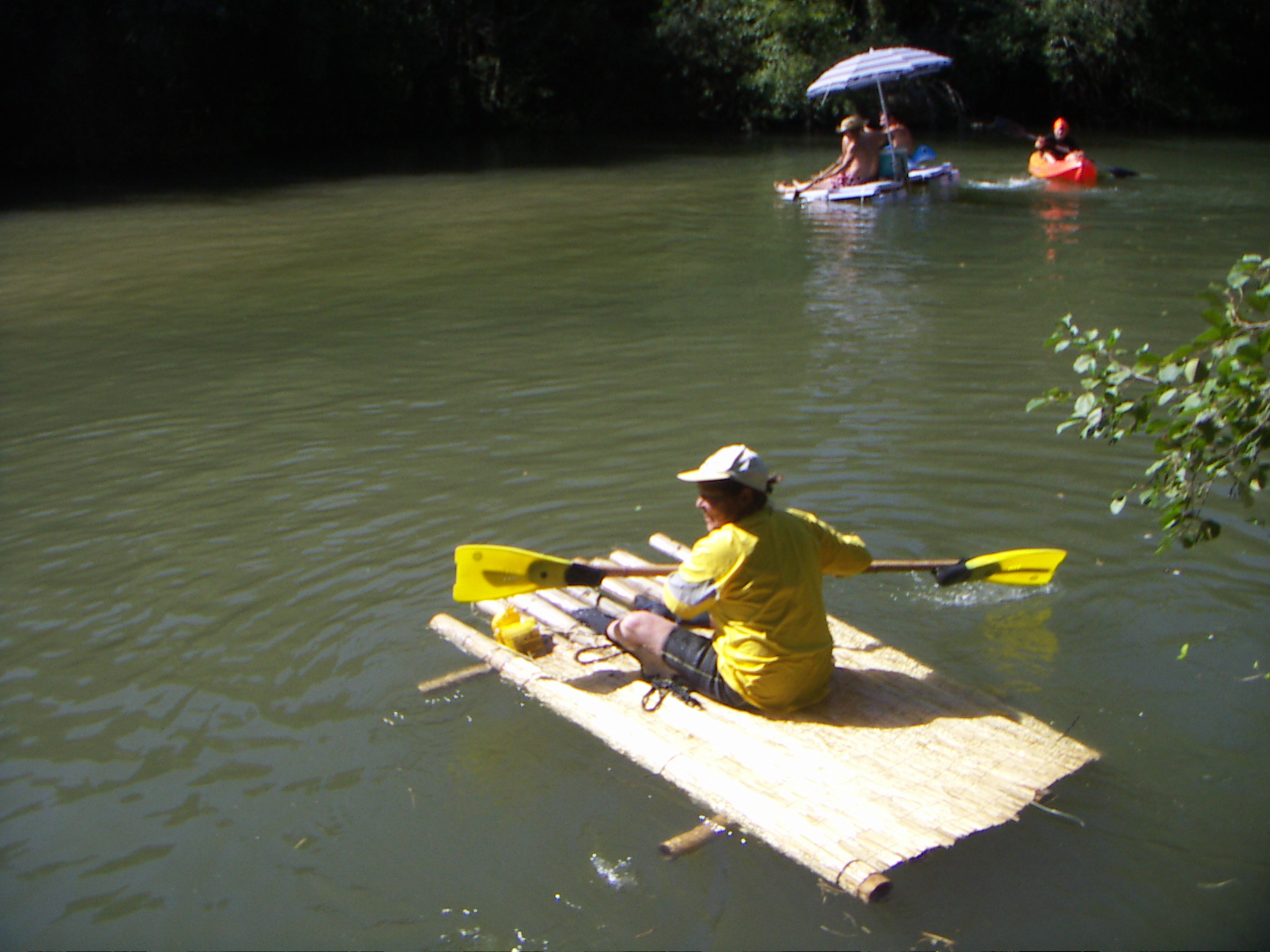 balsa amb canyes de bambú (Guadua angustifolia)